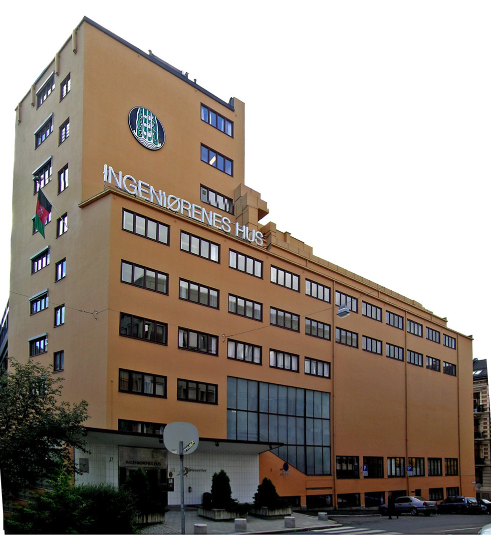 Ingeniørenes hus, Kronprinsens gate 17, Oslo. Built 1931. Architects: Eivind Moestue and Ole Schistad.